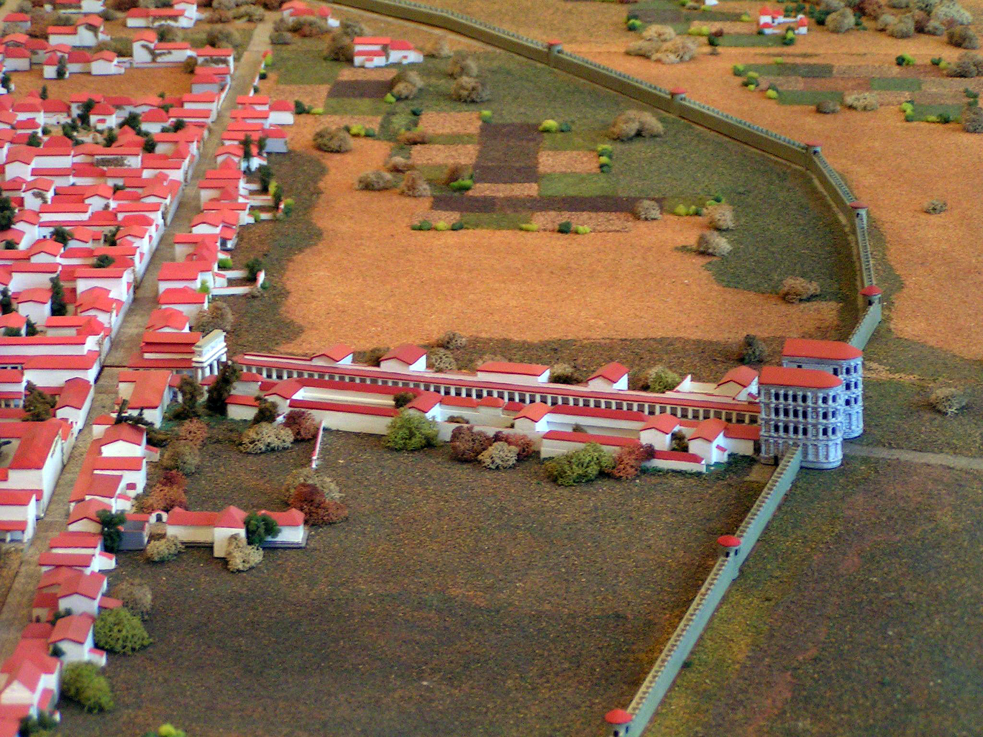 Beschreibung: Trier-Modell des römischen Triers, Porta Nigra (Modell gebaut von Joachim Woditsch, Trier) Quelle: selbst erstellt im Rheinisches Landesmuseum Trier Fotograf: Stefan Kühn